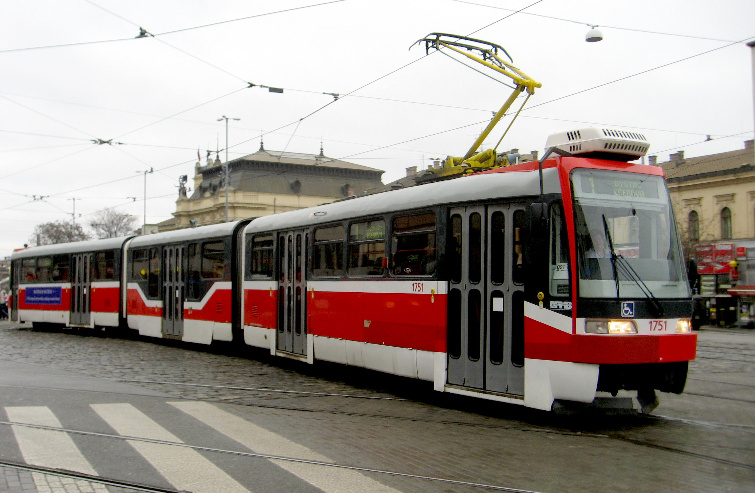 Tramvaj typu Tatra K3R-N v Brně